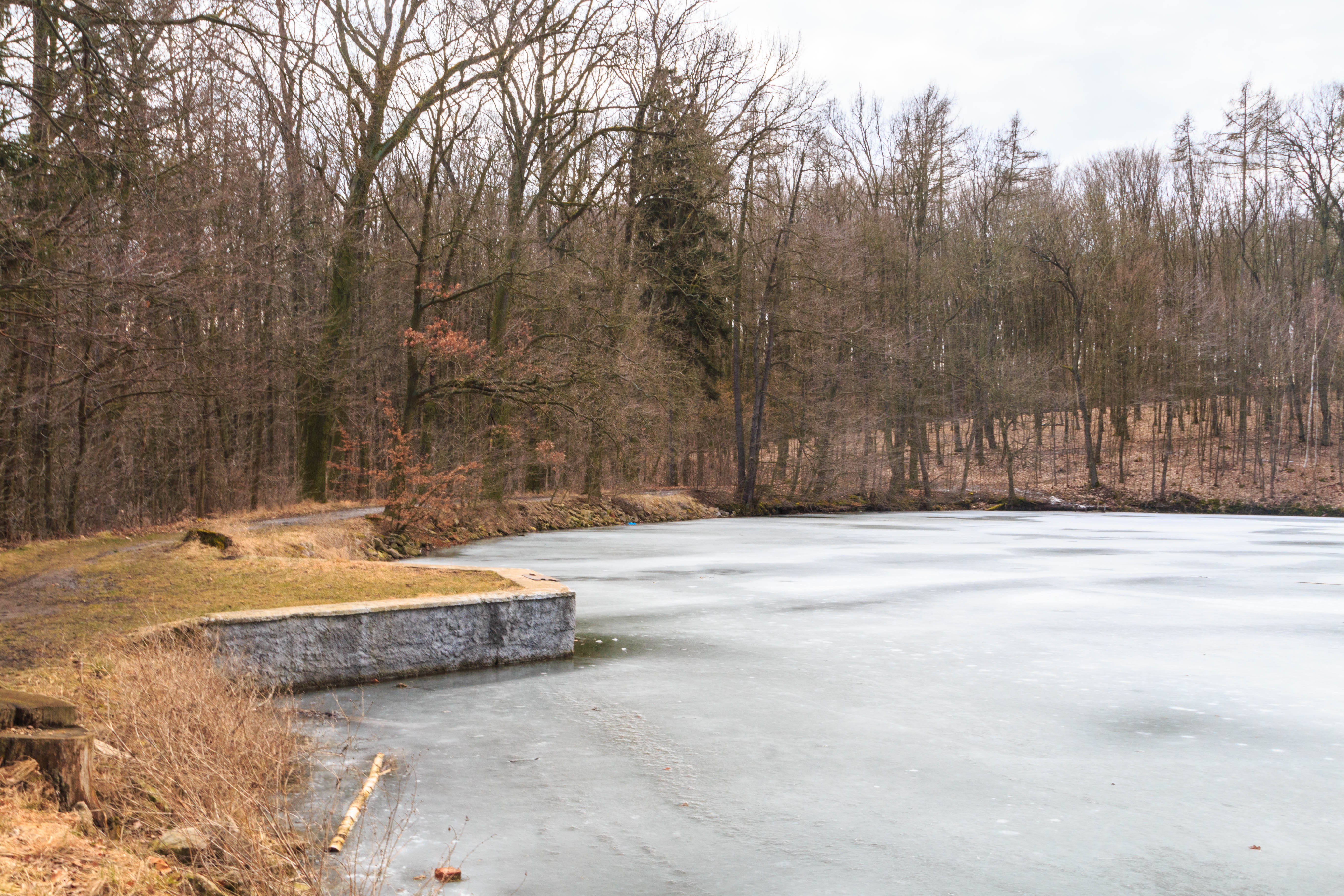 Klechtávecký rybník u Rohoznice Project: Vodstvo.